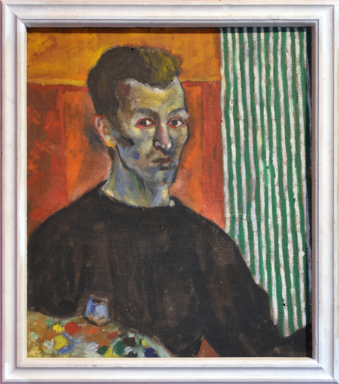 Jaroslav Vožniak, Autoportrét (poč. 50. let), olej 75 x 66 cm, Museum Kampa